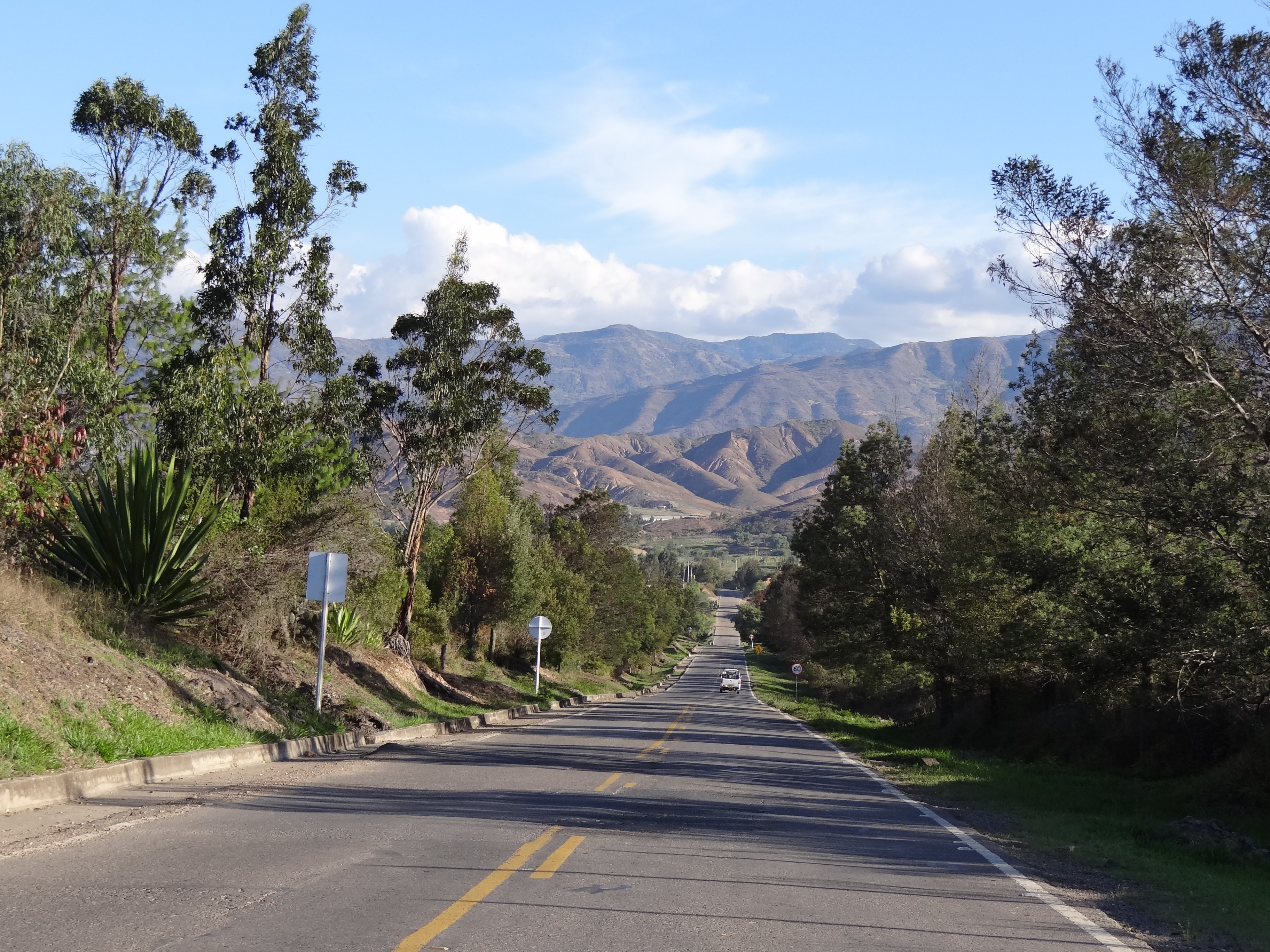 Ruta Nacional 60 a la altura del municipio de Sáchica, departamento de Boyacá, Colombia.